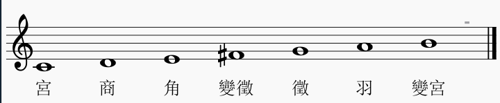 七聲調式中的雅樂音階